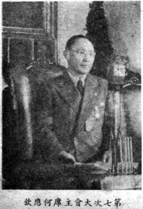 第一屆國民大會第七次大會主席何應欽。